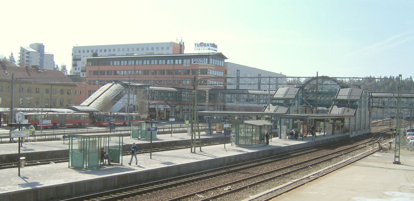 Tumba järnvägstation, busstation och Centrum år 2006